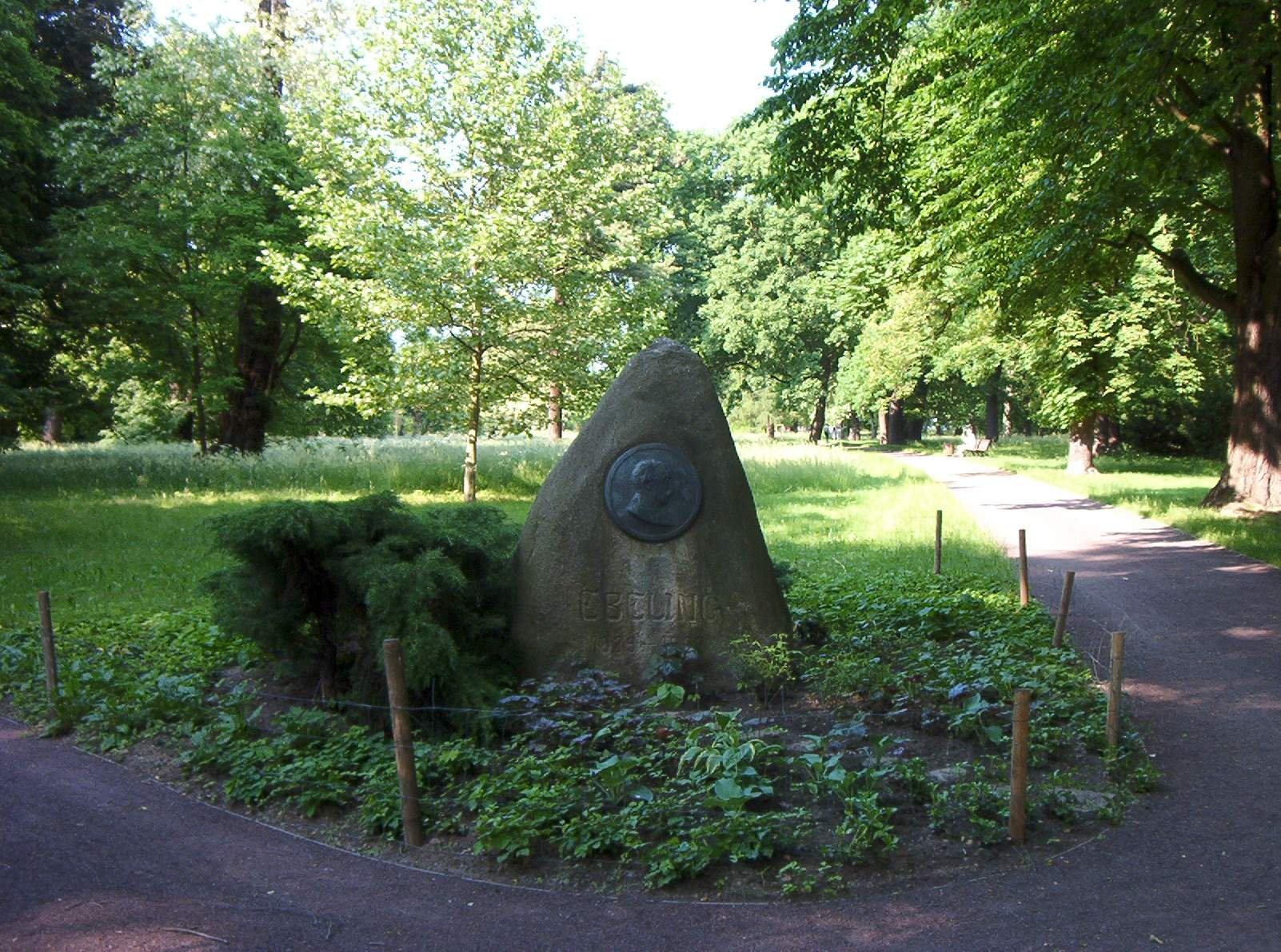 Ebeling-Gedenkstein im Herrenkrugpark Magdeburg, selbst aufgenommen am 29.5.2005, erteilte Lizenz: GNU-FDL